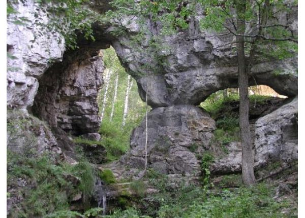 Башҡортса: Күперле шарлауығы